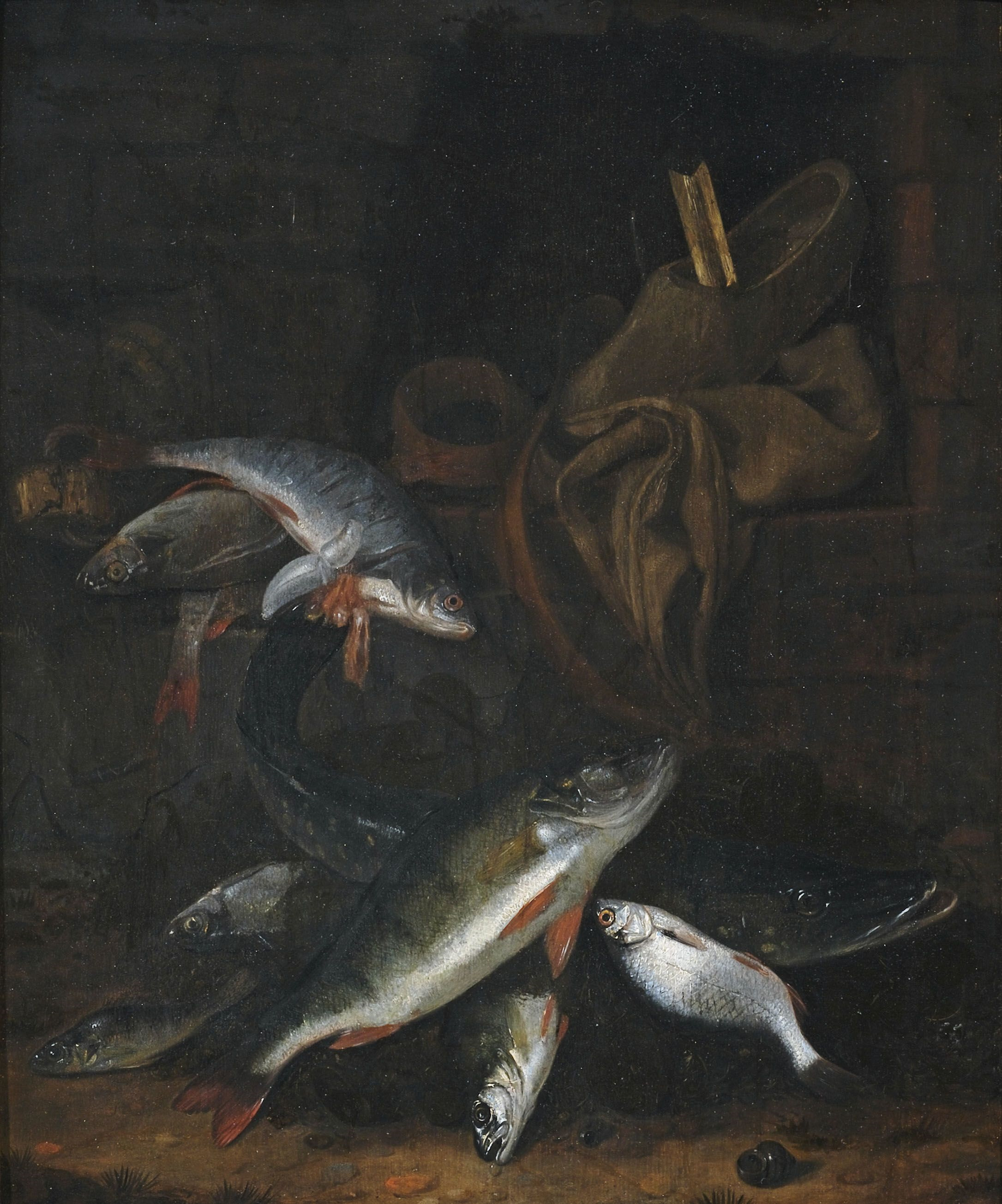 Fischstilleben mit Hecht und Brassen an einer Mauer.